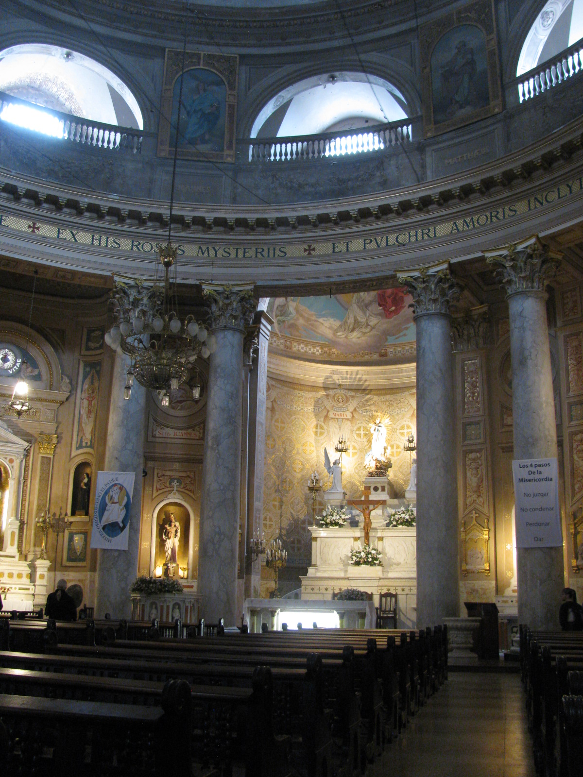 Altar